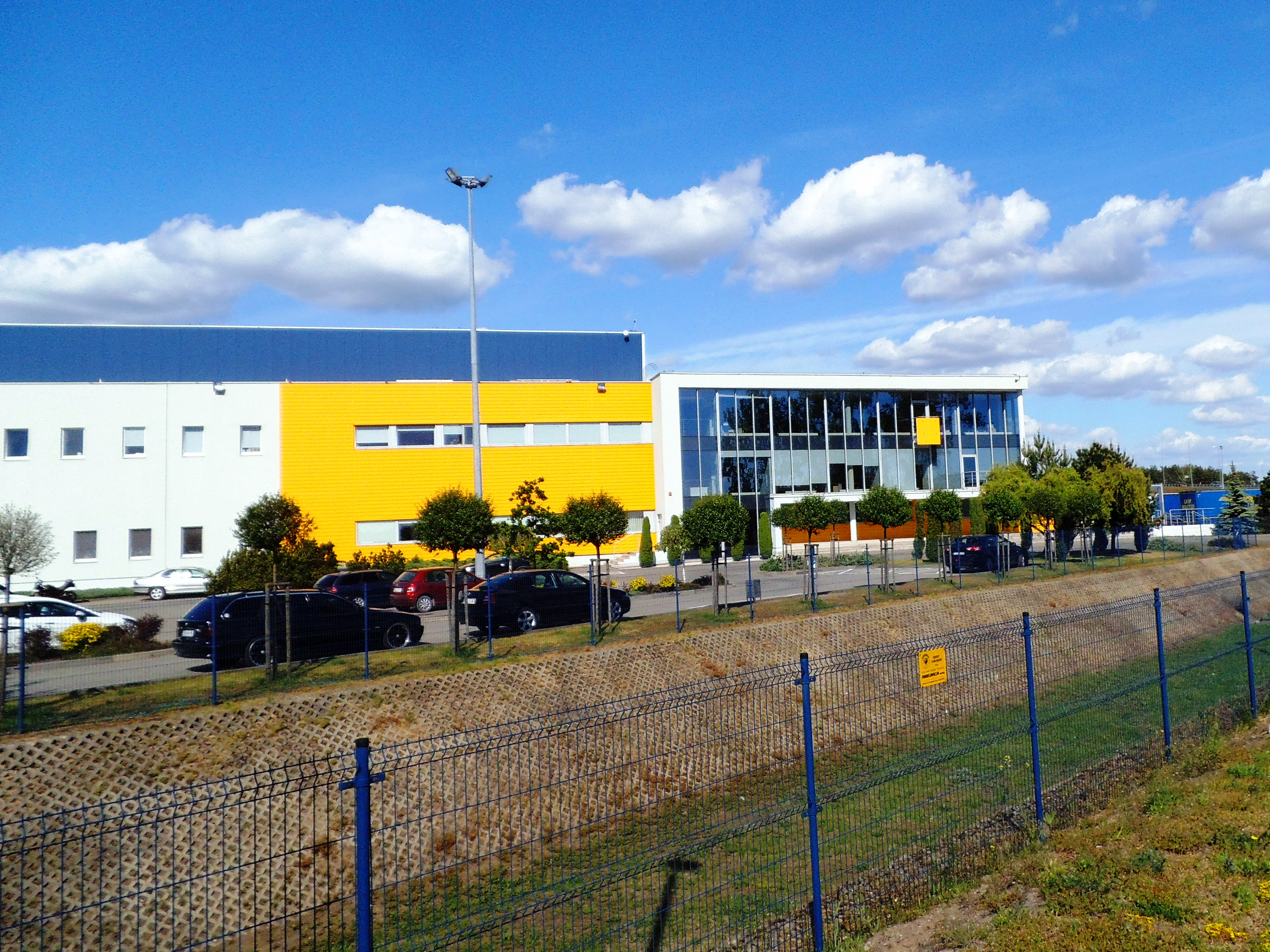 Toruńskie Zakłady Materiałów Opatrunkowych1